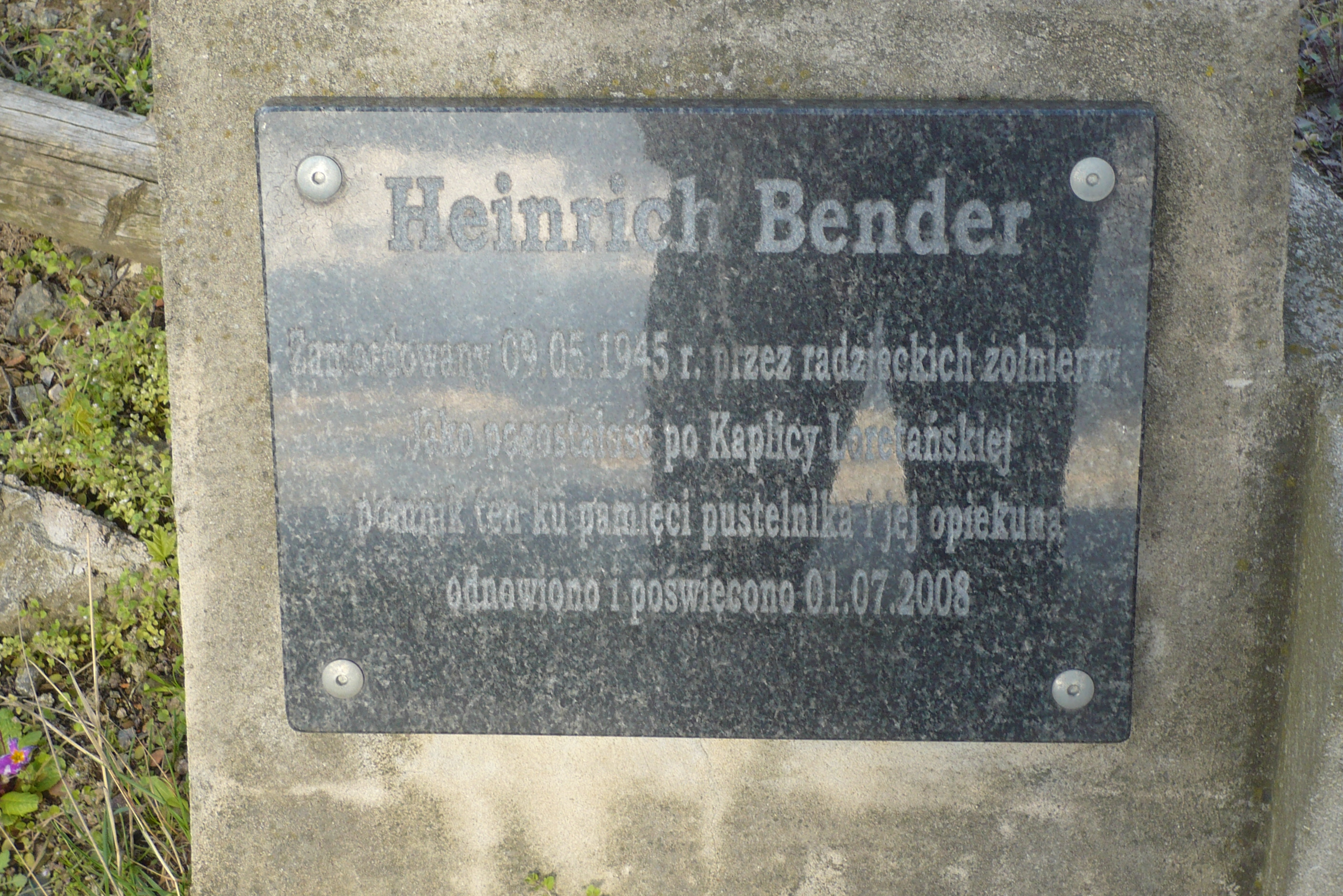 Bożków. Kapliczka